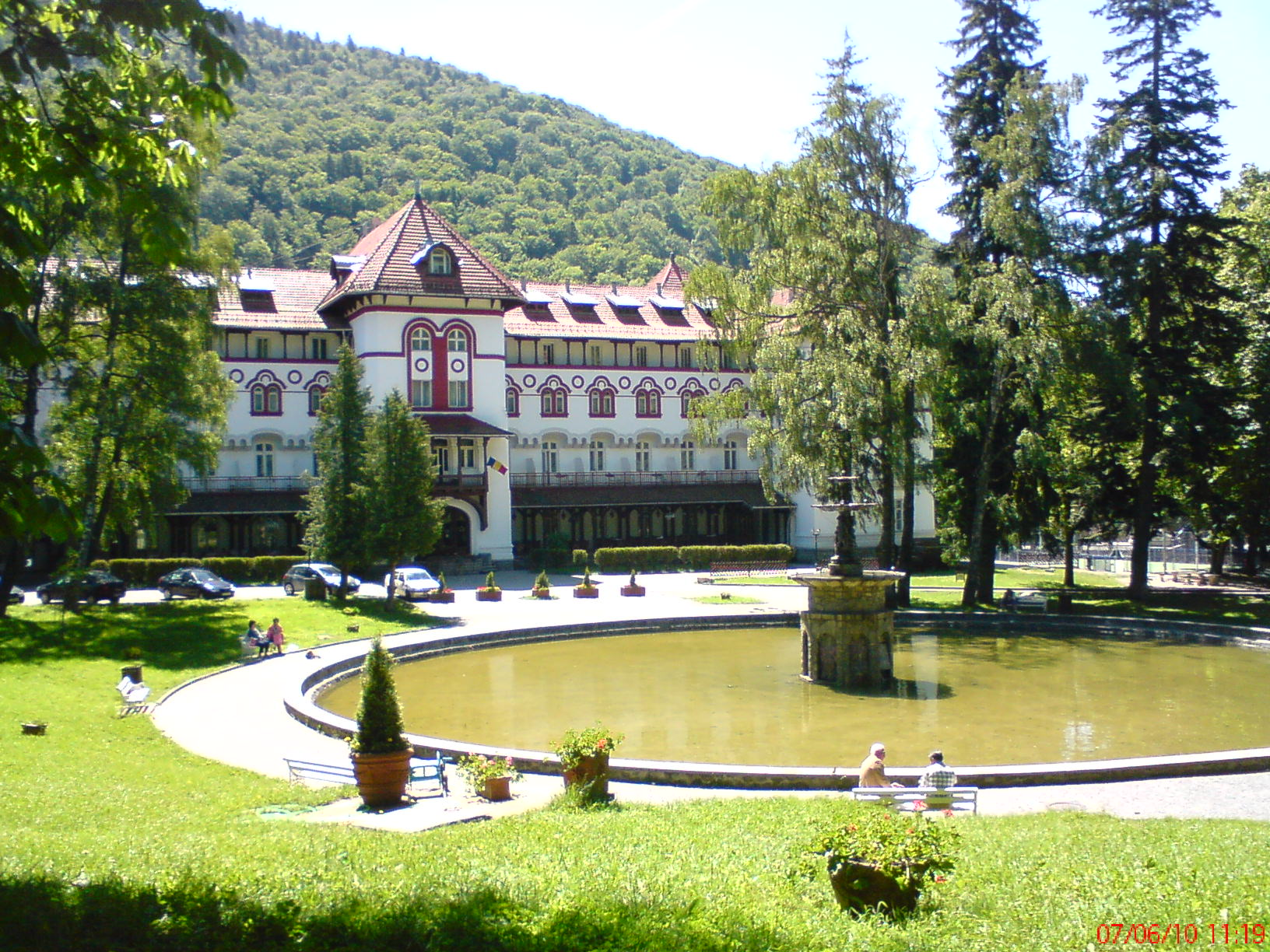 Hotel Caraiman